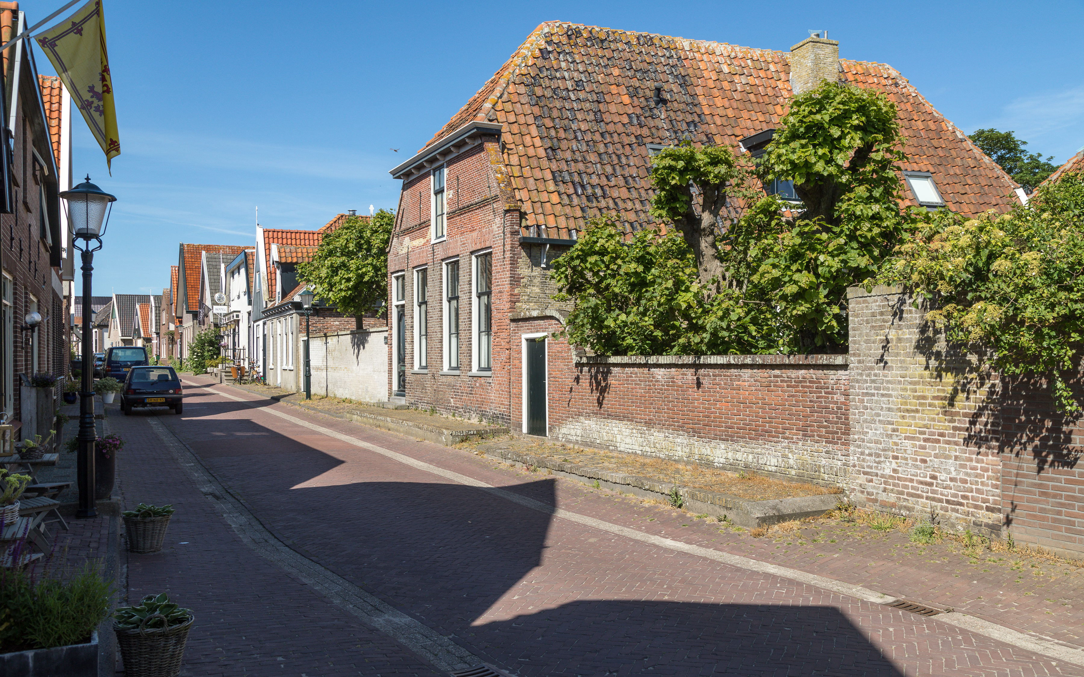 Herenstraat in Den Hoorn, Texel, Niederlande